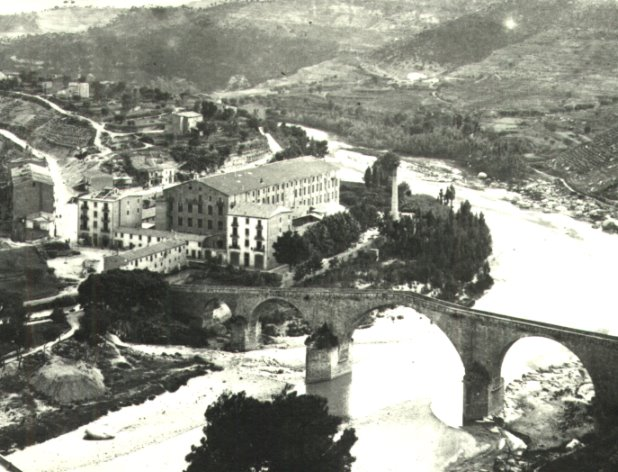 Pont vell i fàbrica Burés al 1910 (Castellbell i el Vilar-Bages-Catalunya).